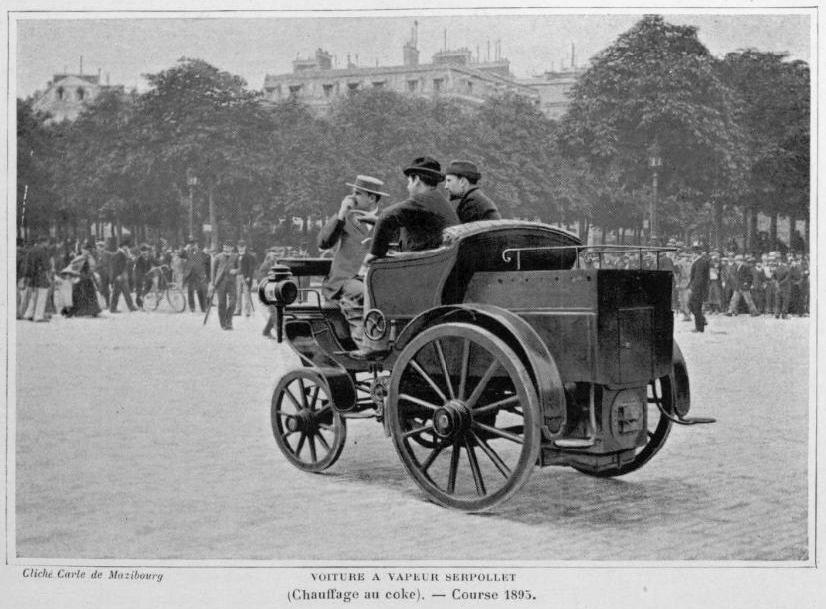 Voiture à vapeur Serpollet, au départ de Paris-Bordeaux-Paris 1895.